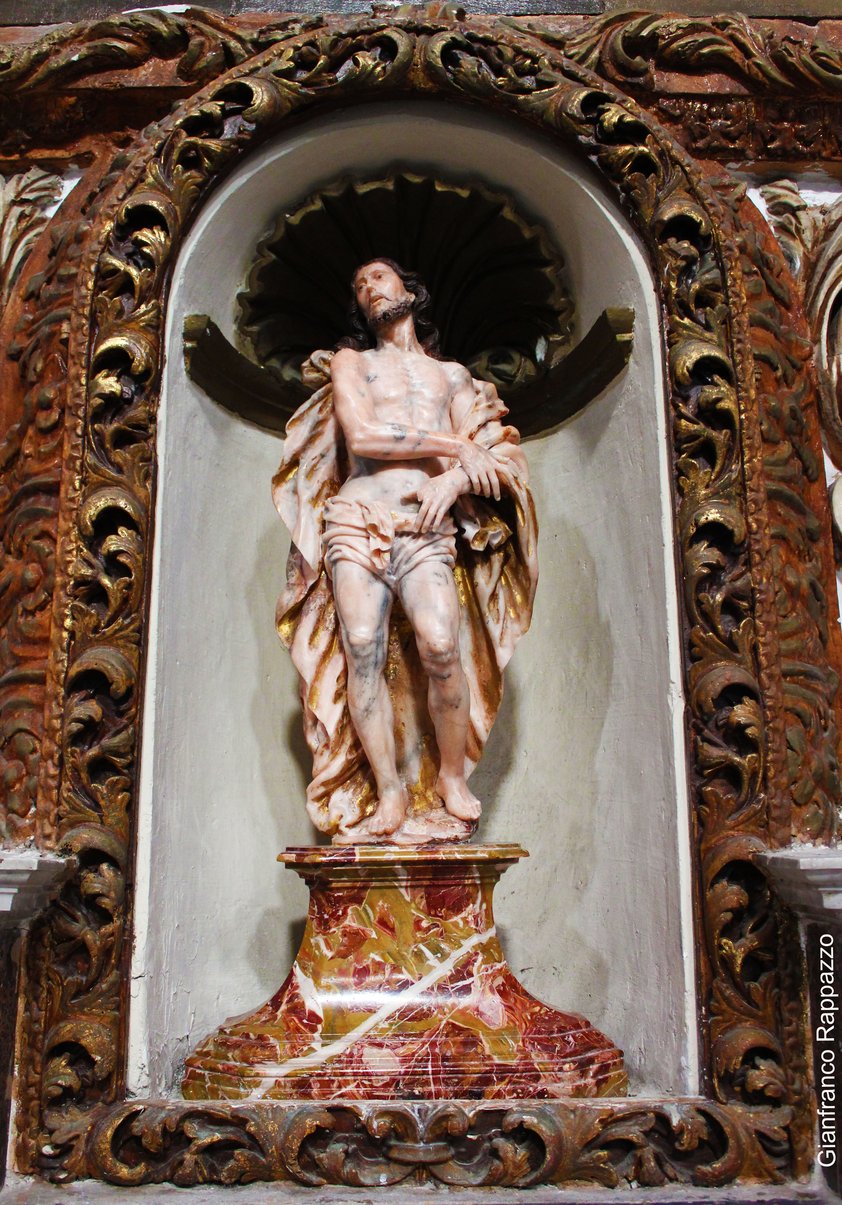 Statua Ecce Homo, Cattedrale, Santa Lucia del Mela